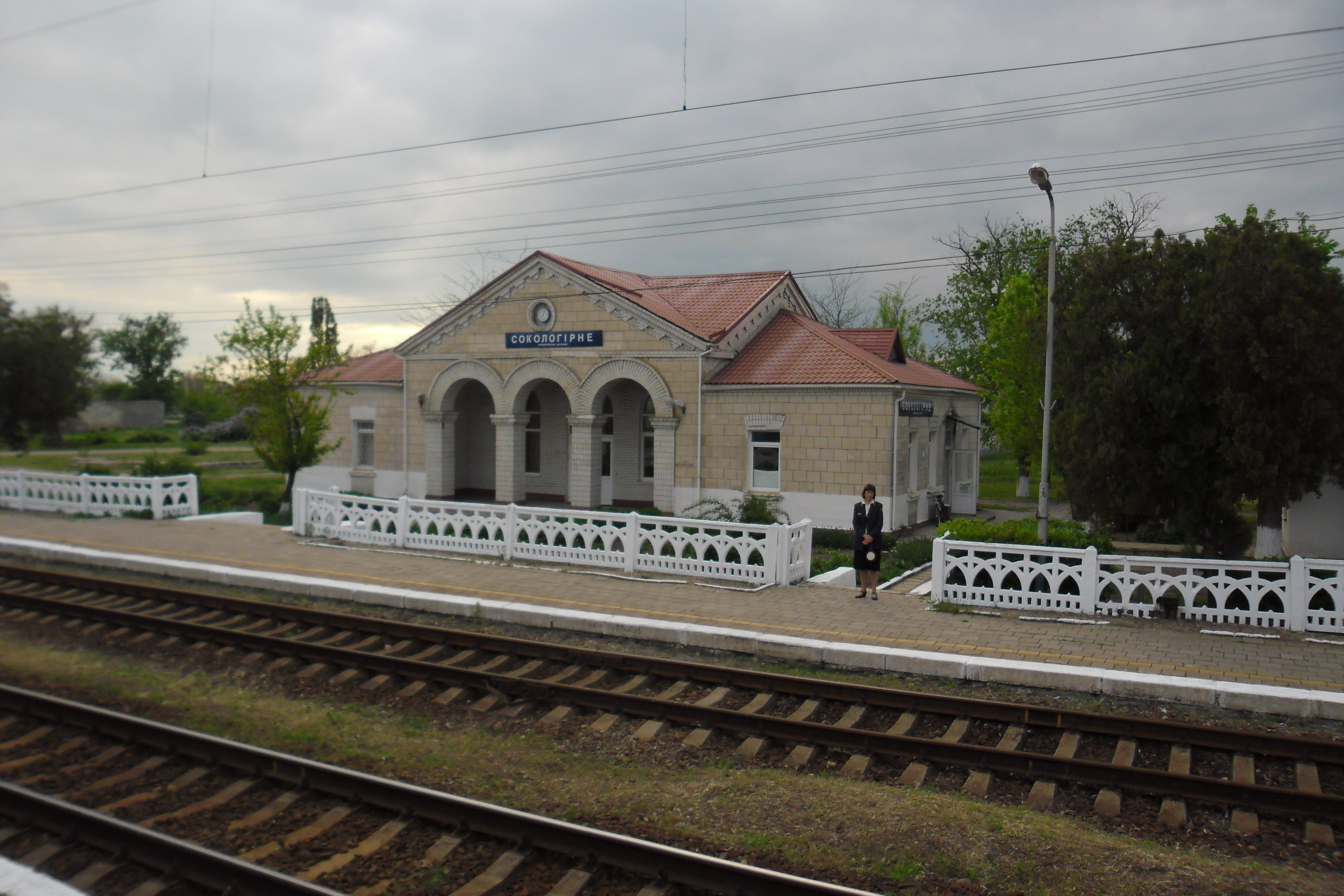 Сокологірне